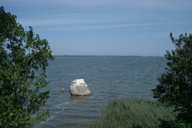 Poland, view from Chrzaszczewska Island on Royal Stone in Kamienski Bay.